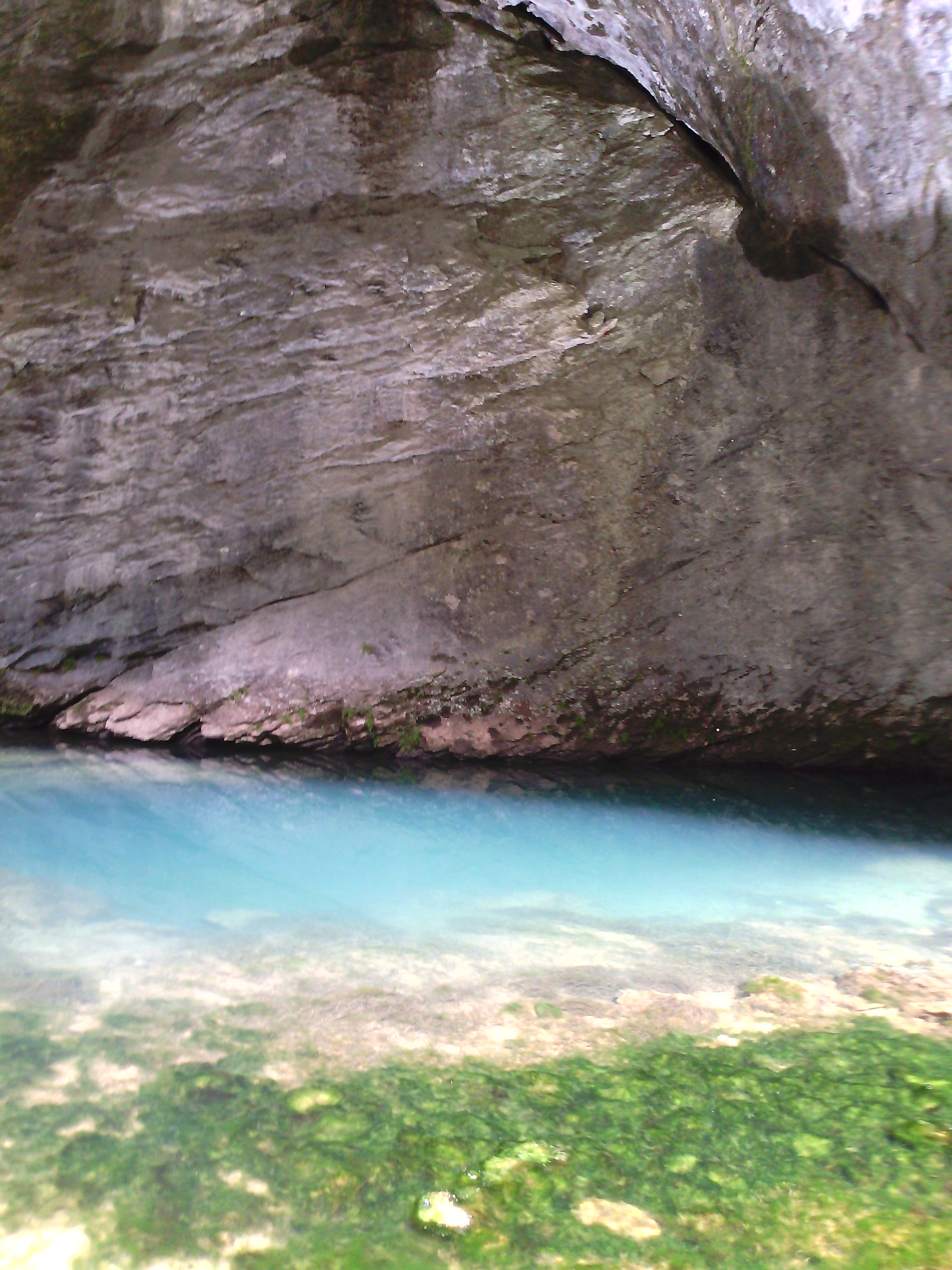 Вход в пещеру Шульганташ Башҡортса: Шүлгәнташ мәмәрйәһенең ауыҙы